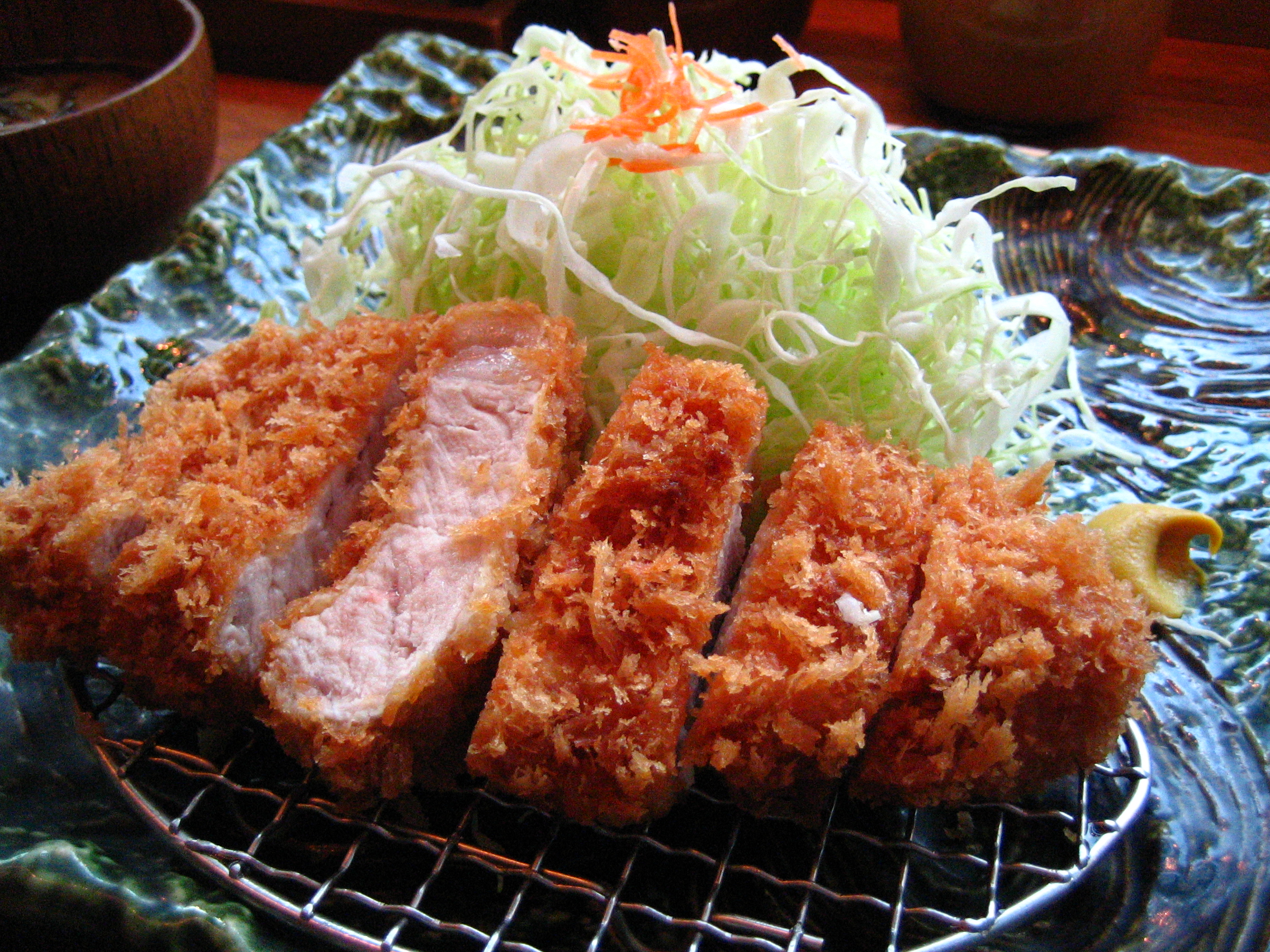 とんかつ（平田牧場）